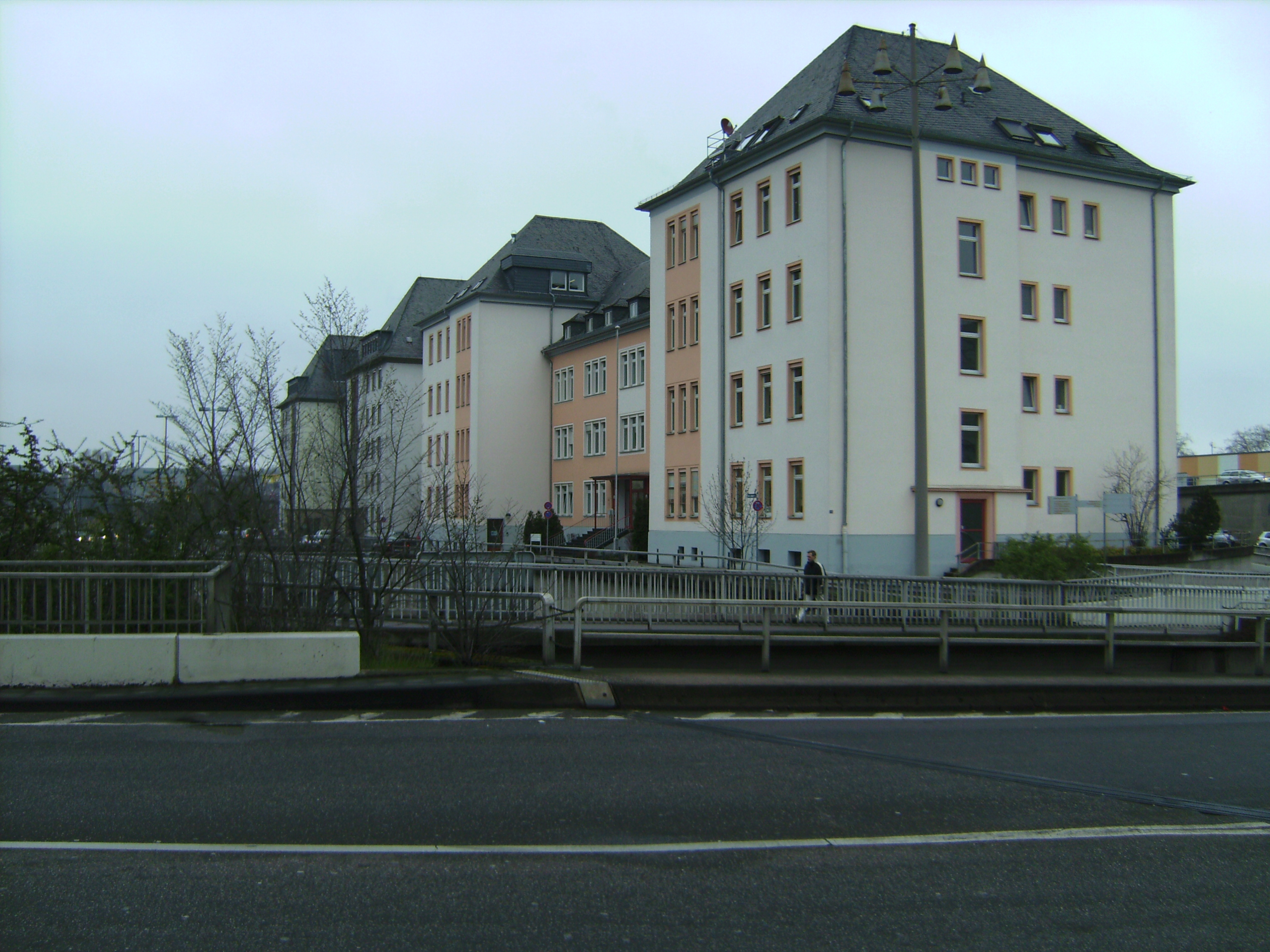 vormalige Falckenstein-Kaserne des kgl. preuß. Pionier Btaillon Nr. 8